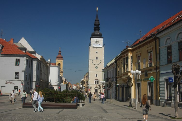 Trnava, Slovakia